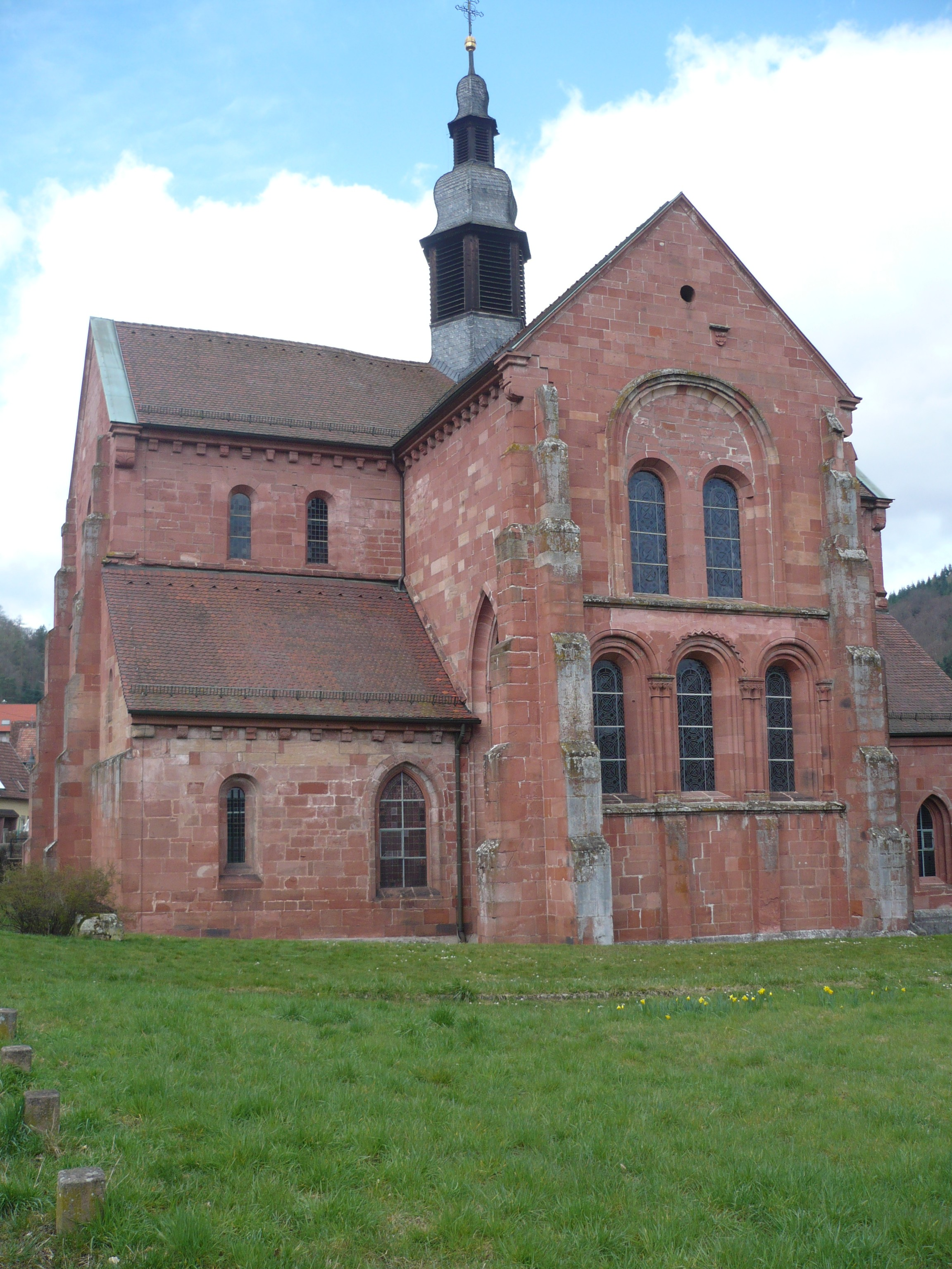 Kloster Eußerthal von Südosten